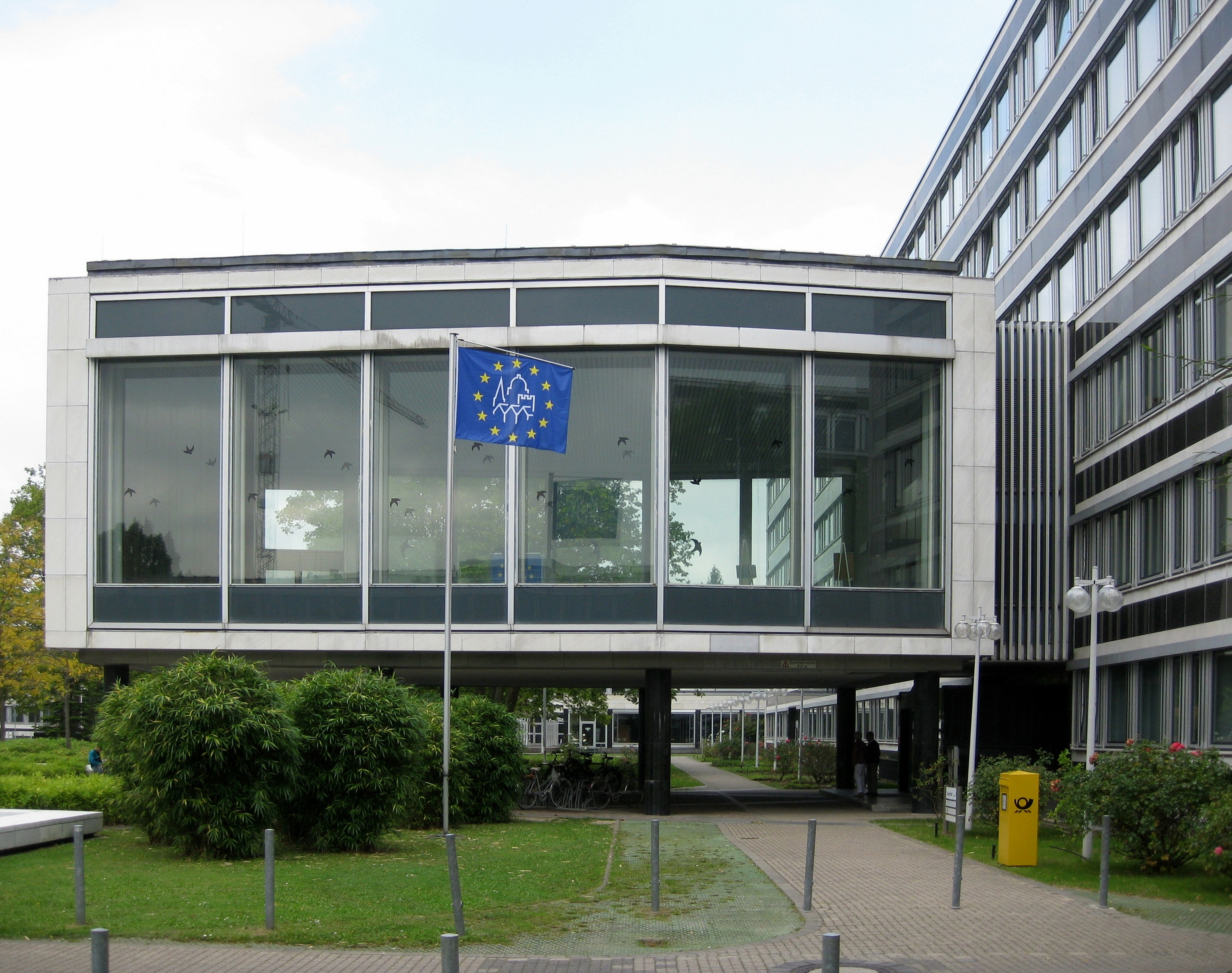 Saal der Bundespressekonferenz in Bonn, Tulpenfeld 7: Außenansicht